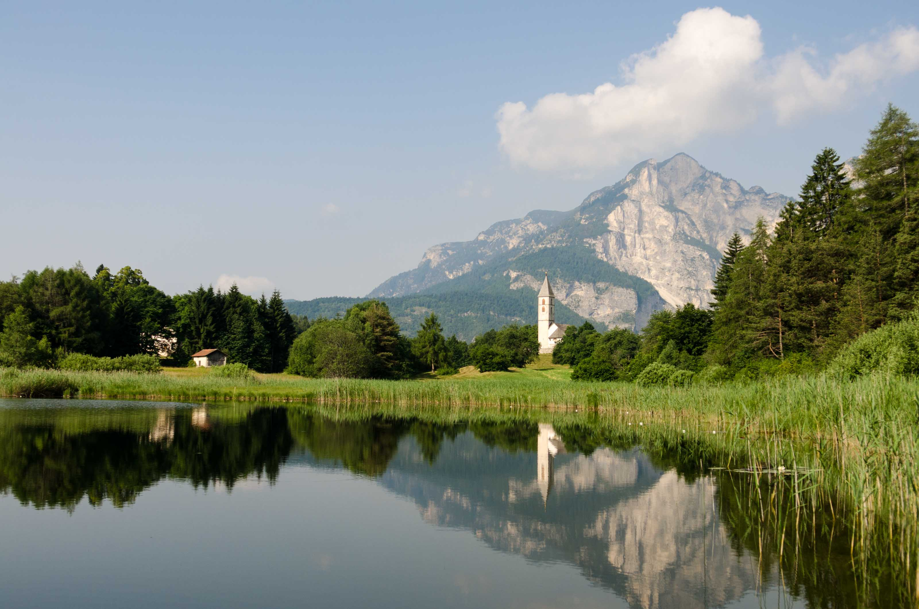 Klassische Ansicht des Fennberger Sees, dahinter das Kirchlein zum Hl. Leonhard und die Wiggerspitze (Cima Roccapiana)